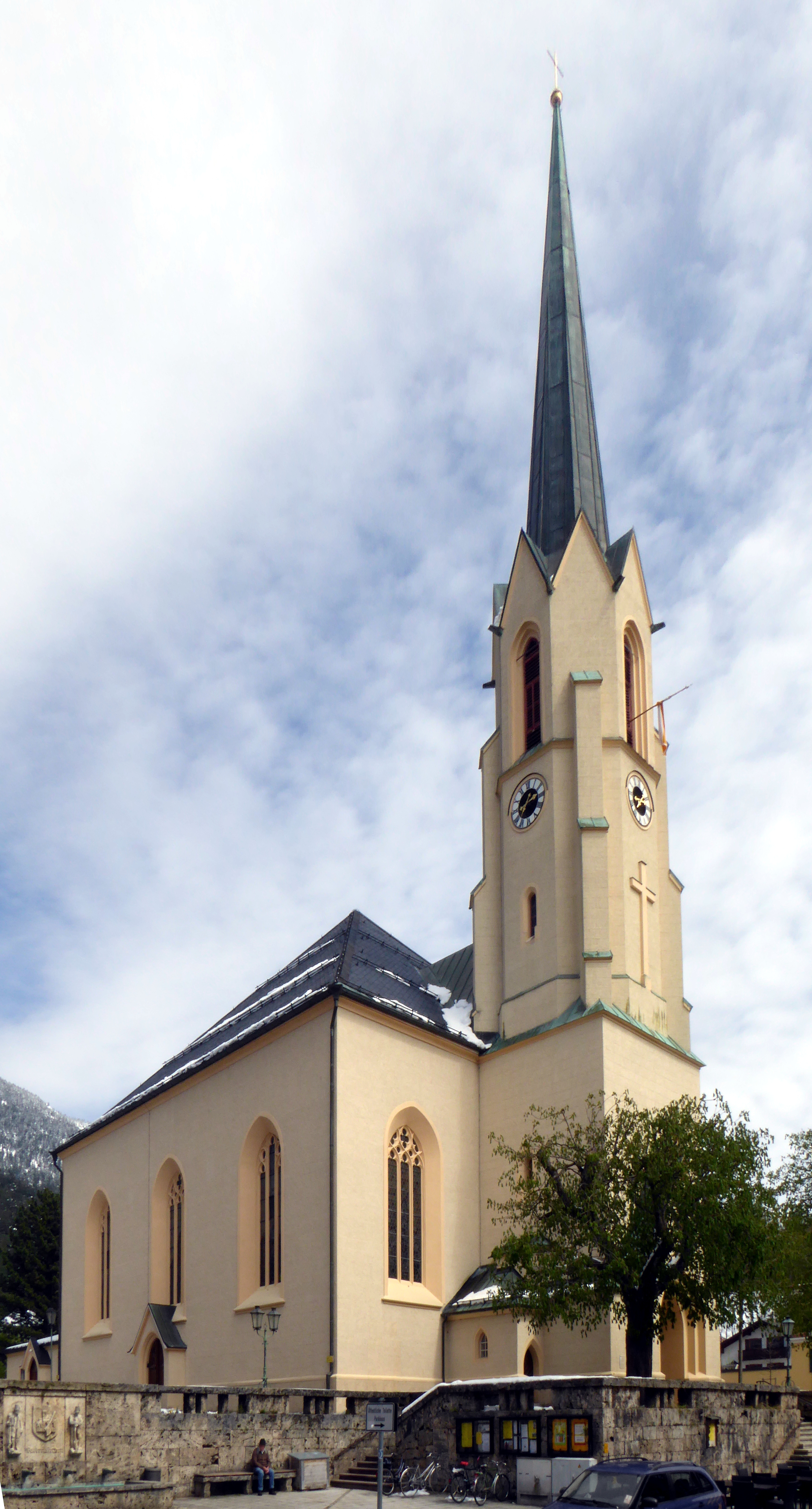 Partenkirchen, Pfarrkirche Mariä Himmelfahrt, von Westen gesehen.